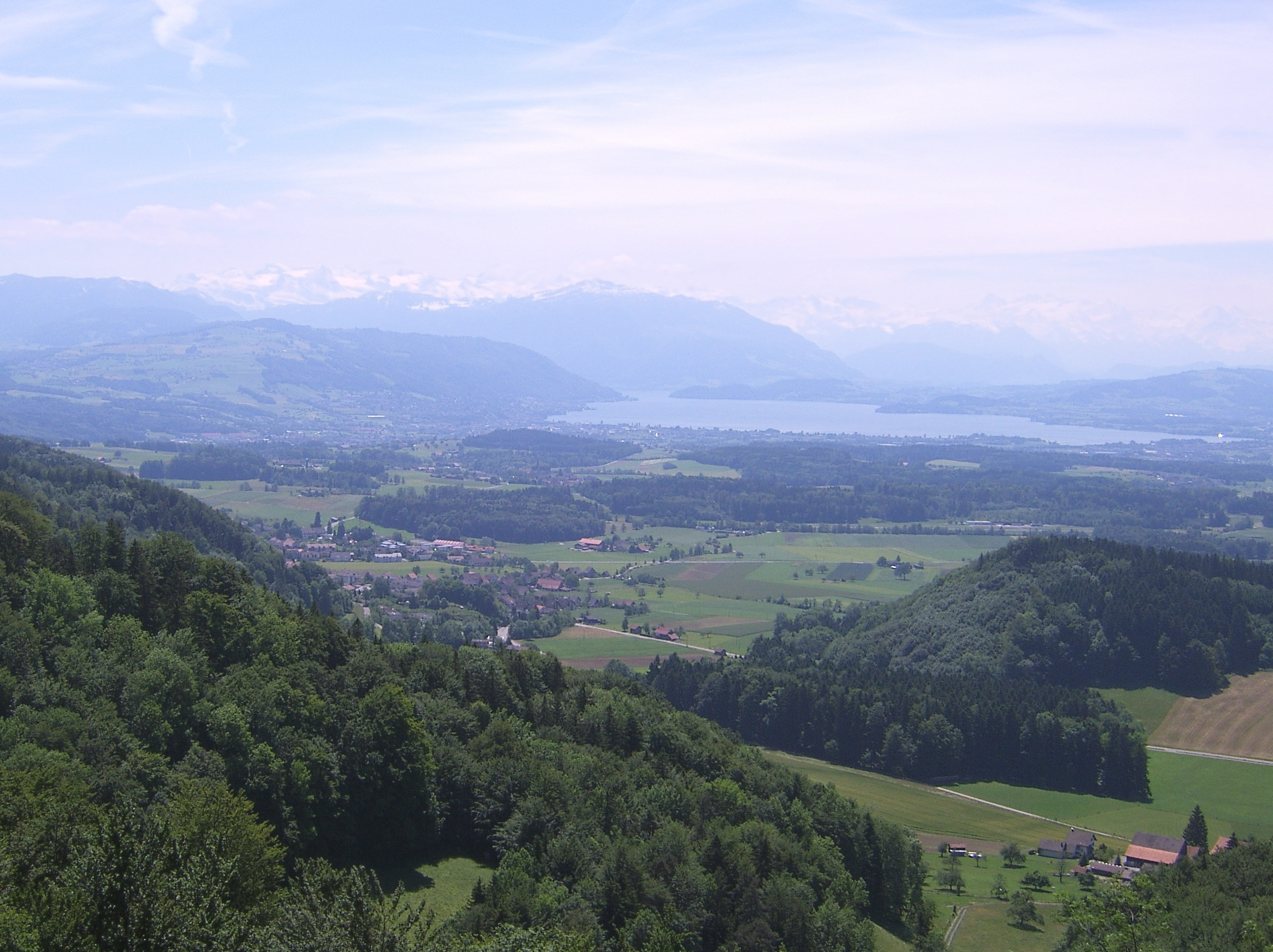 Blick vom Aussichtsturm Hochwacht über Hausen am Albis zum Zugersee